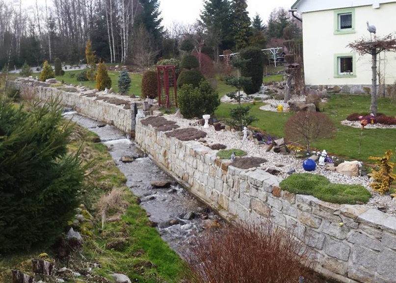 Jaroszycki strumień